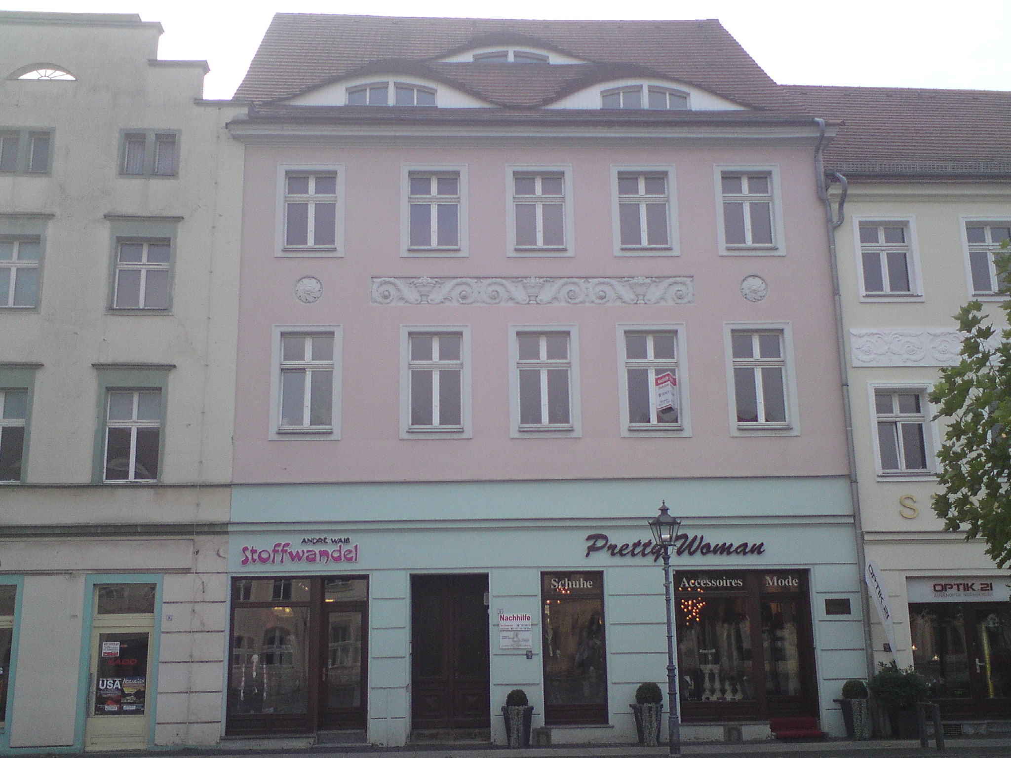 Cottbus Altmarkt 20